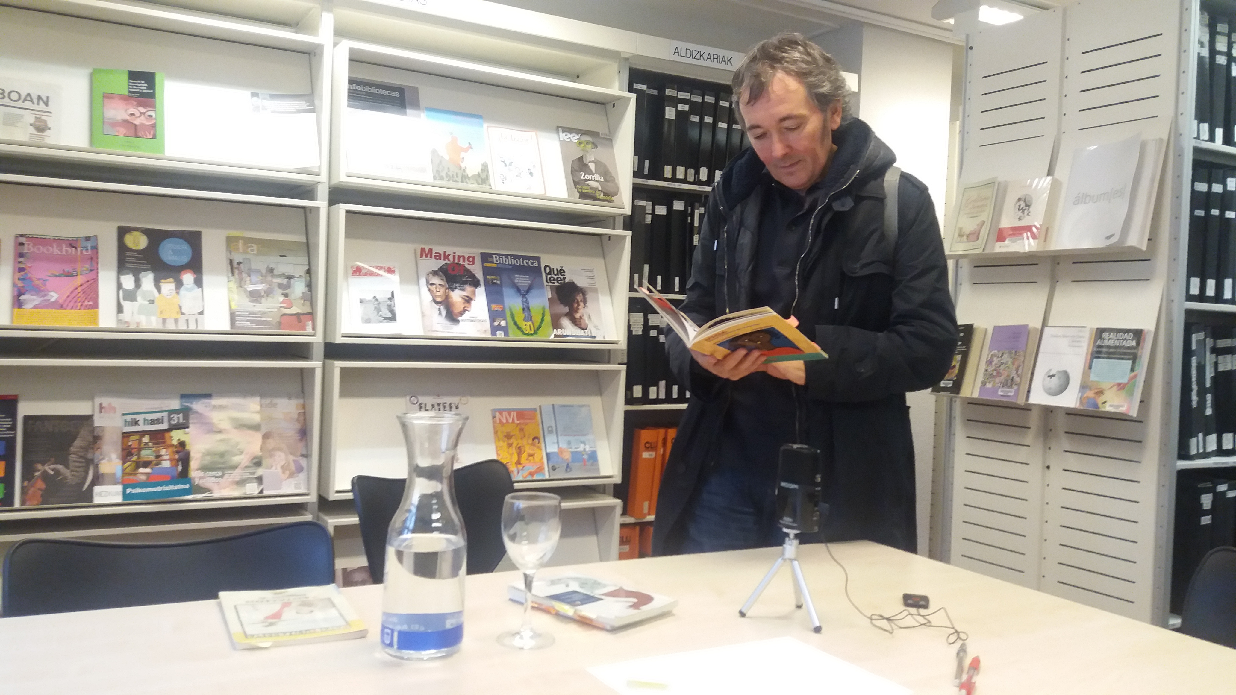 Patxi Zubizarreta idazlea Donostiako Haur Liburuaren Dokumentaziogunean. Argazkia: Leire Cano.